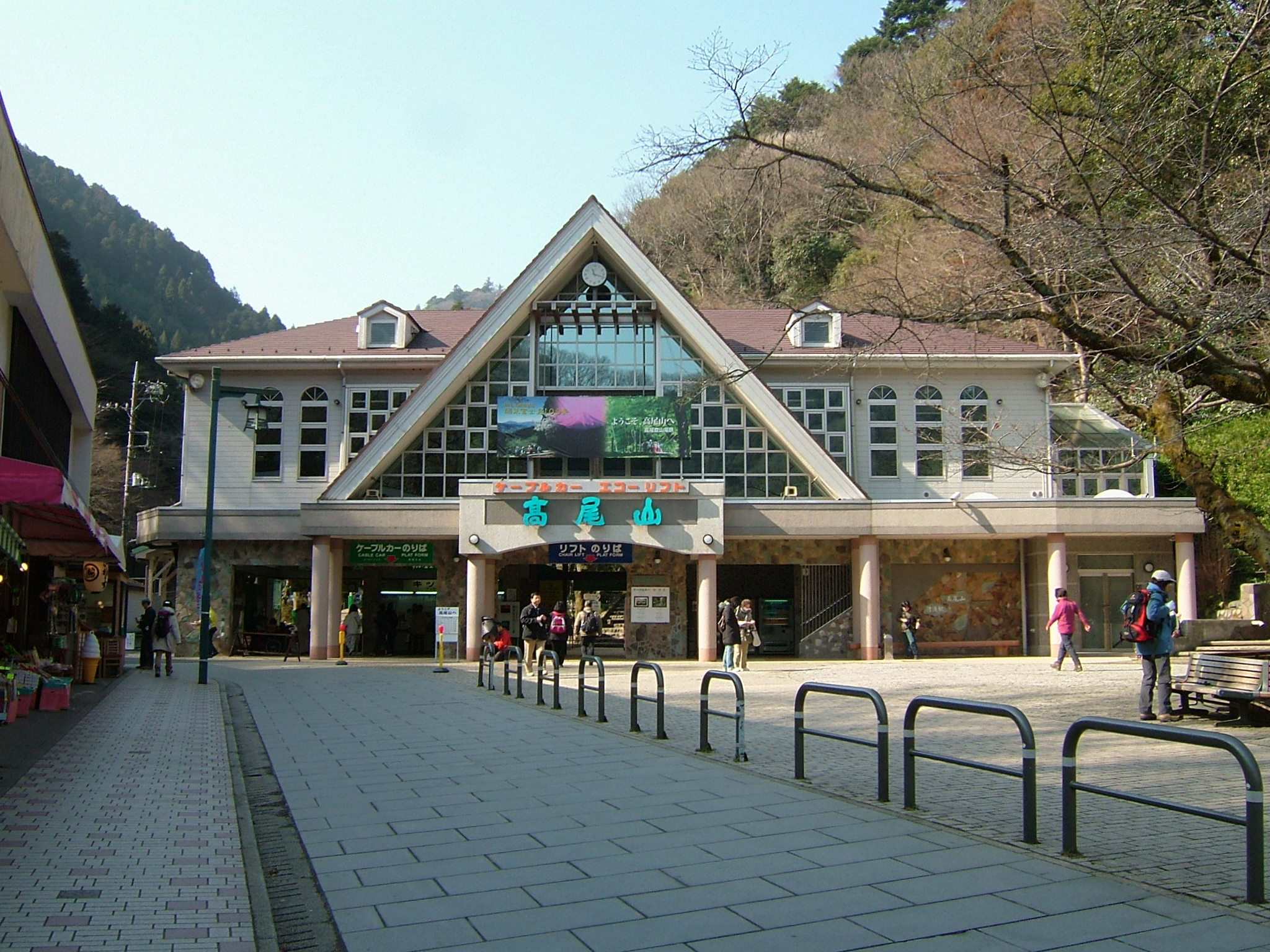 高尾登山電鉄ケーブルカー清滝駅